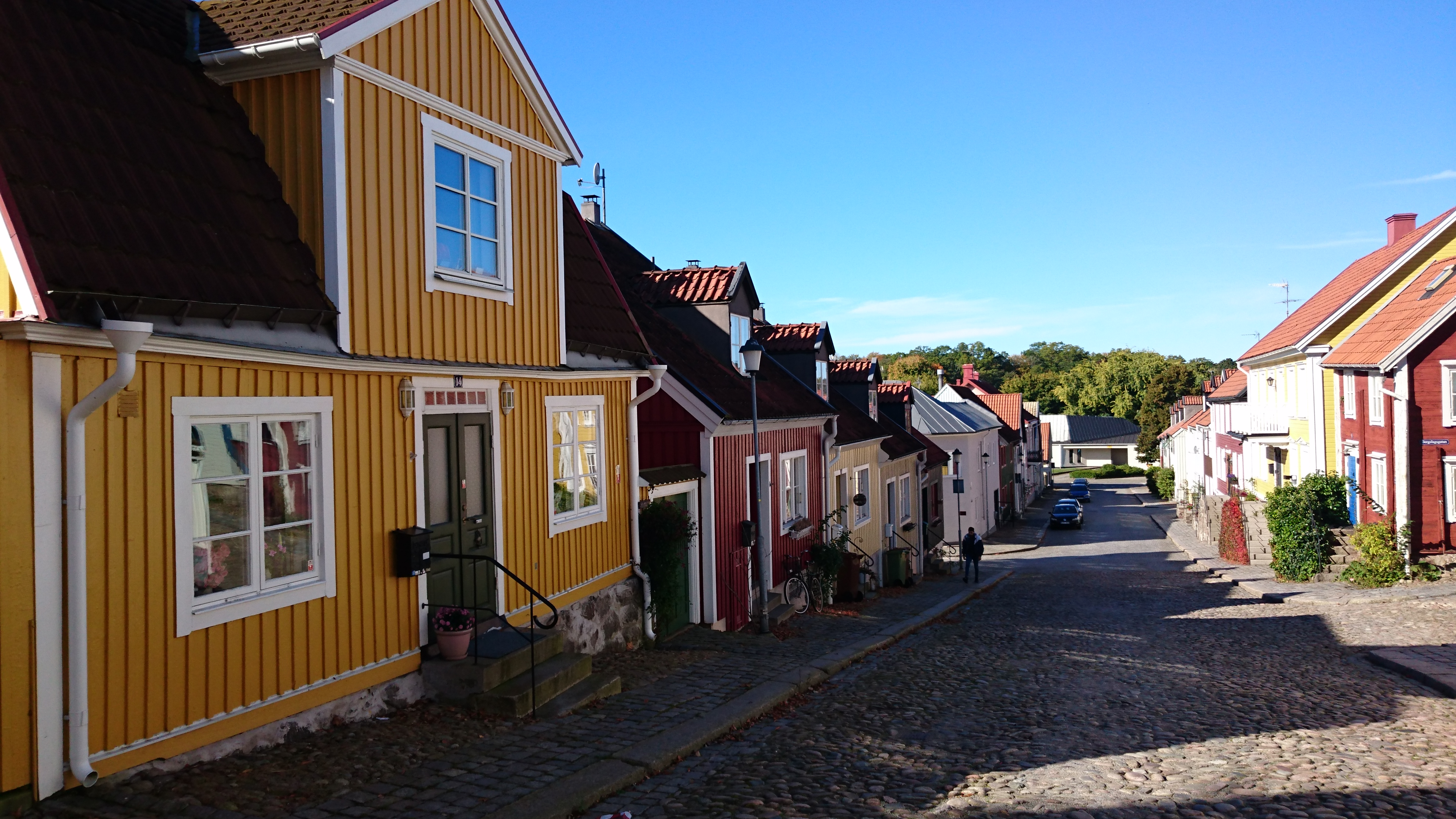 Kvarteret Knut fotograferat vid Kyrkogatan hösten 2017.